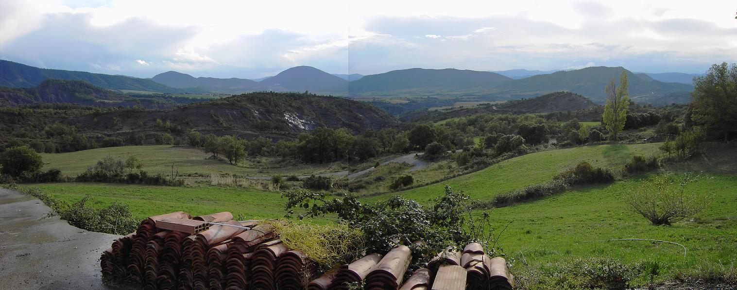 Vistas del Valle de La Fueva desde el caserío de Lascorz, en la comarca oscense del Sobrarbe.